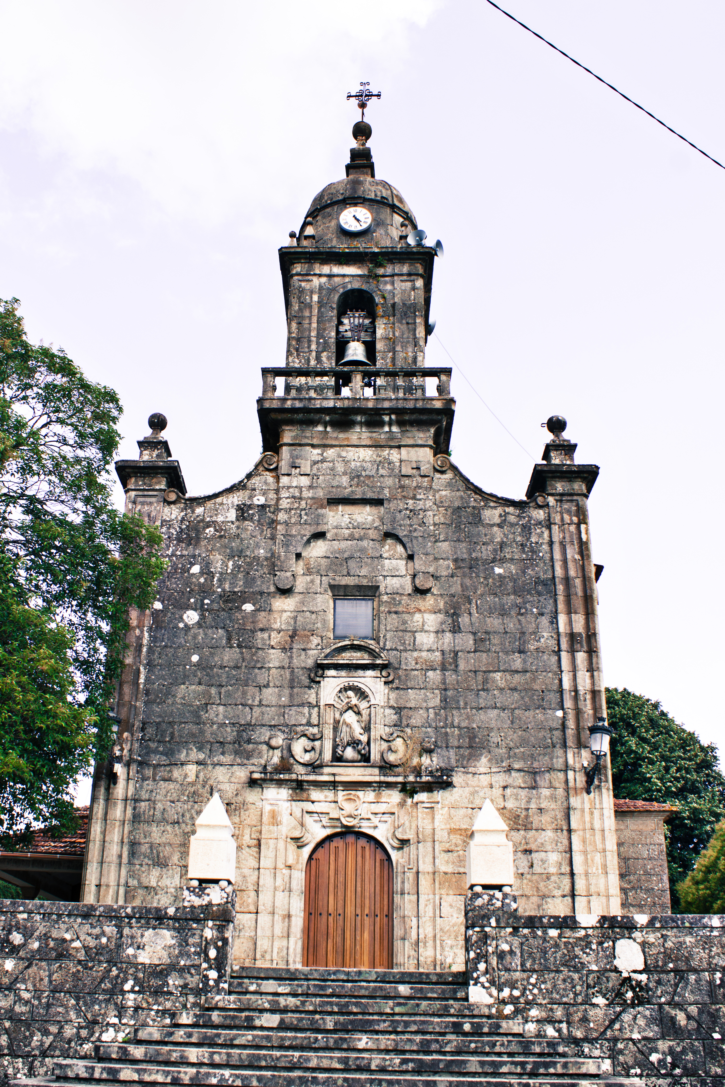 Igrexa de Arbo.